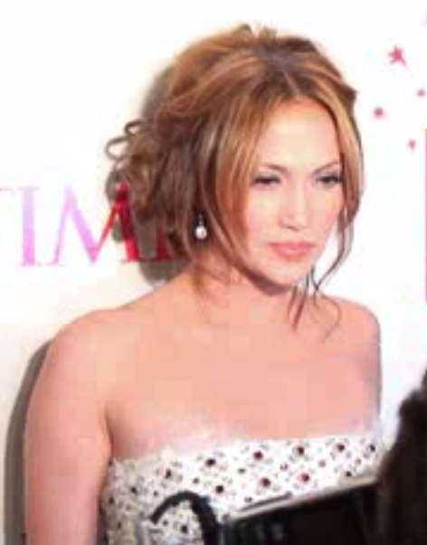 Time 100 2006 gala, Jennifer Lopez.